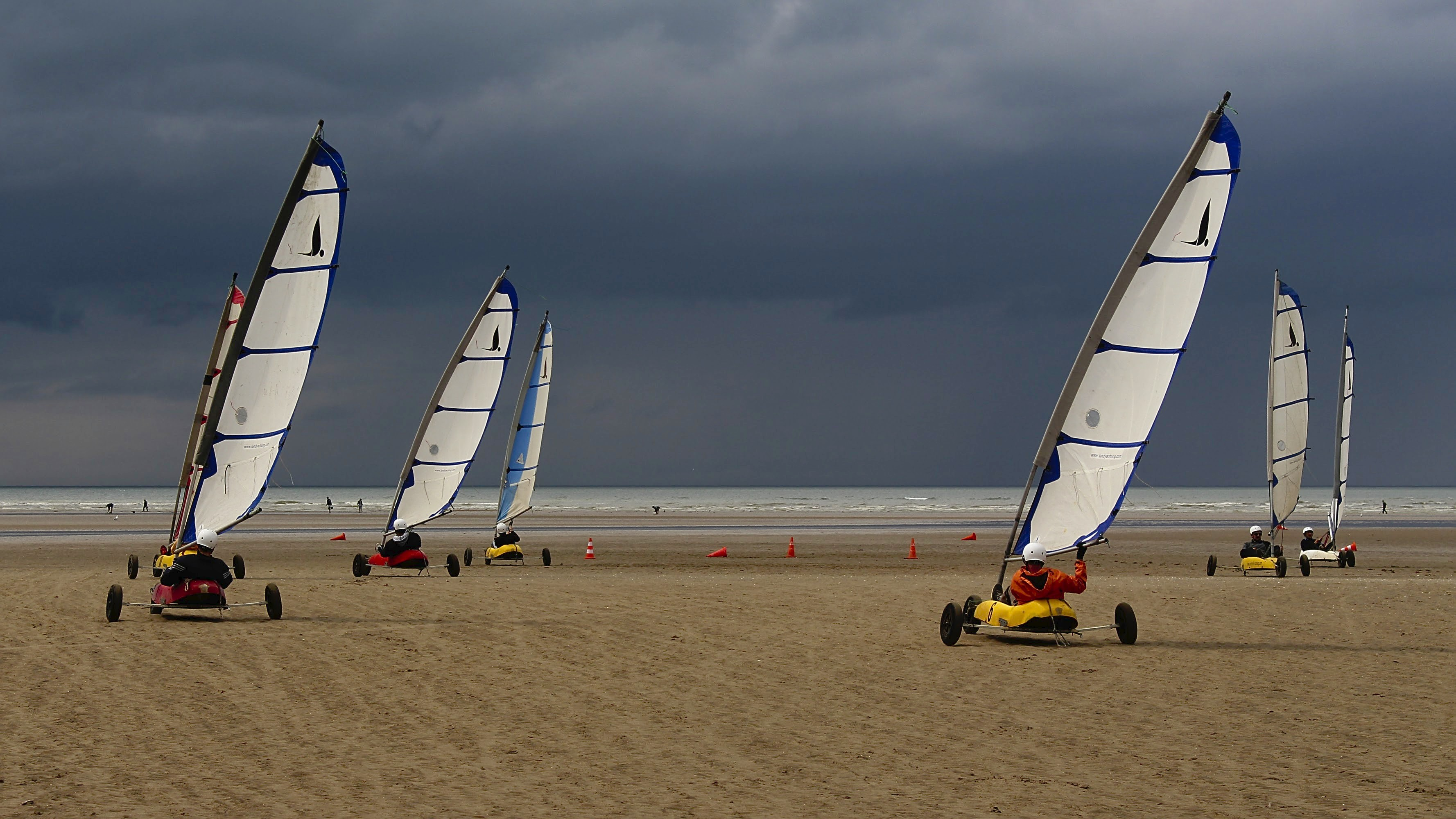 Char à voile sur la plage de Cabourg